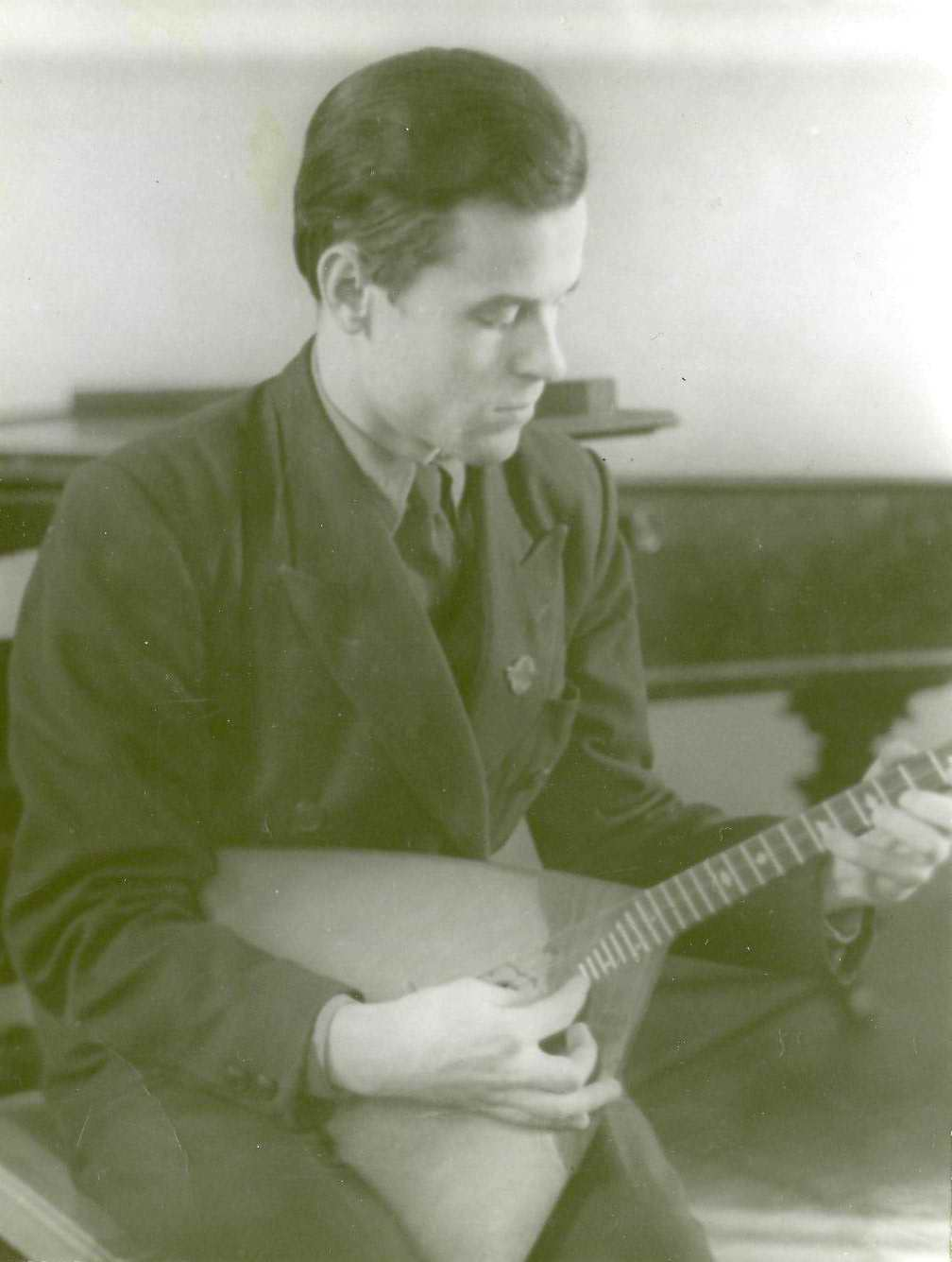 На занятиях в институте им. Гнесиных (г.Москва)